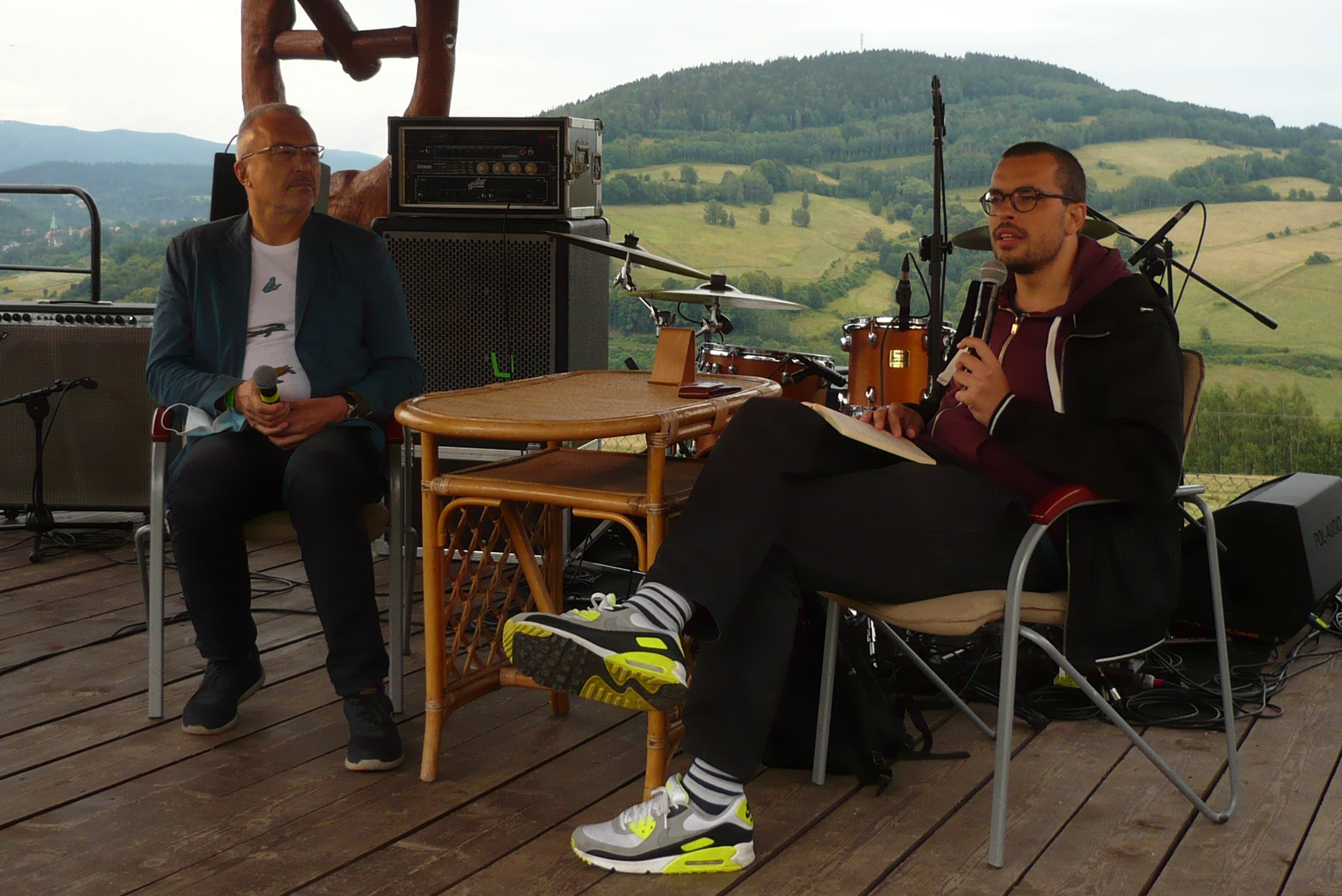 Andrzej Elżanowski, VI Festiwal Góry Literatury, 11.07.2020 r.